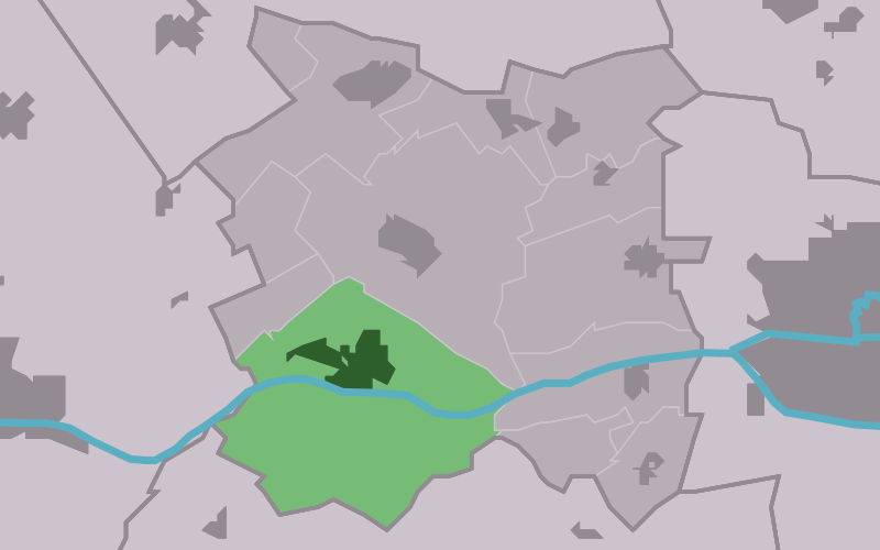 Kaartsje fan himrik fan Dronryp